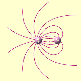 Diagrama que representa el campo electrico producido por dos cargas de diferente signo y diferente maganitud